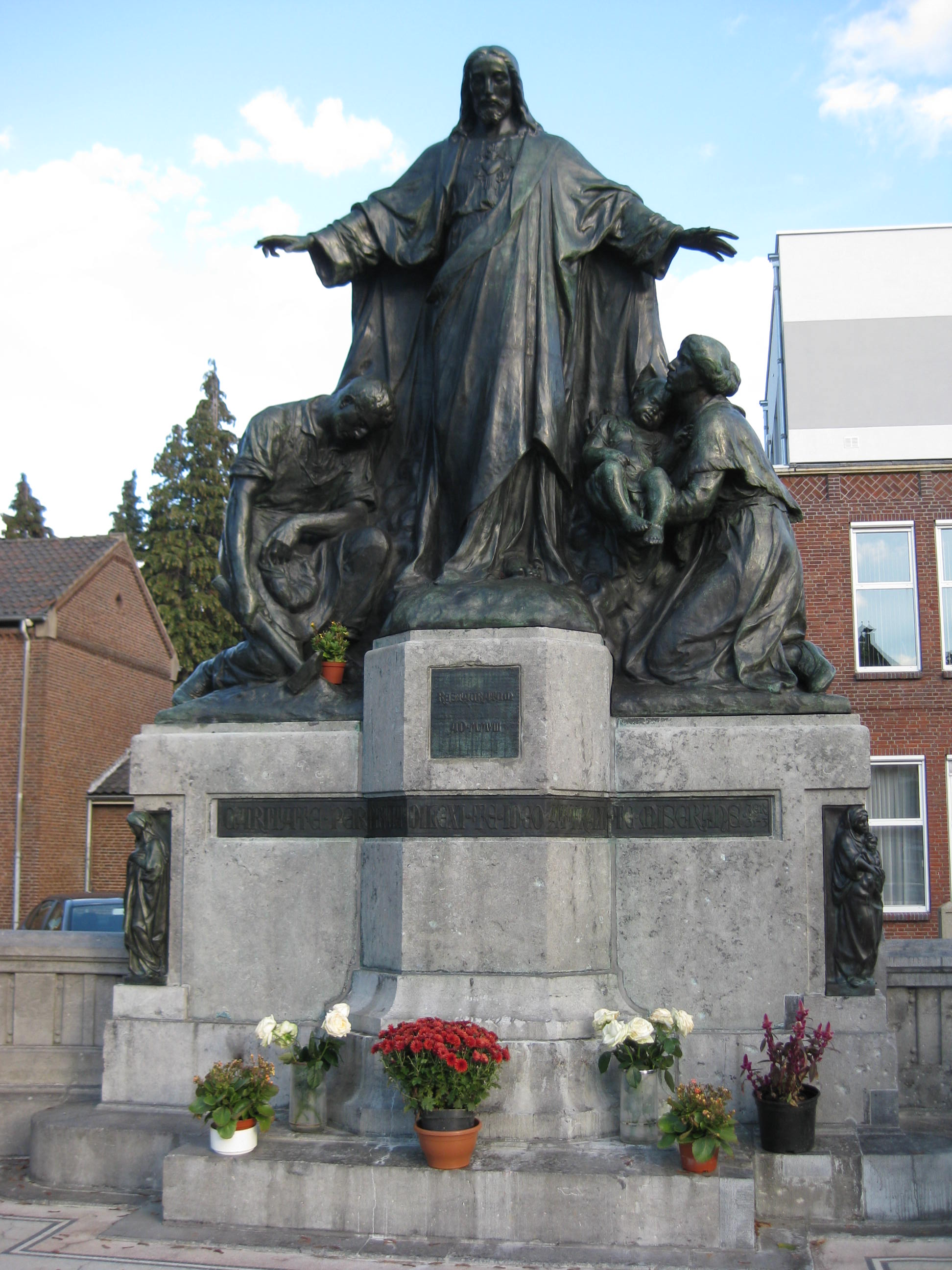 Heilige Hartbeeld, Emmaplein t.o. 21, 's-Hertogenbosch